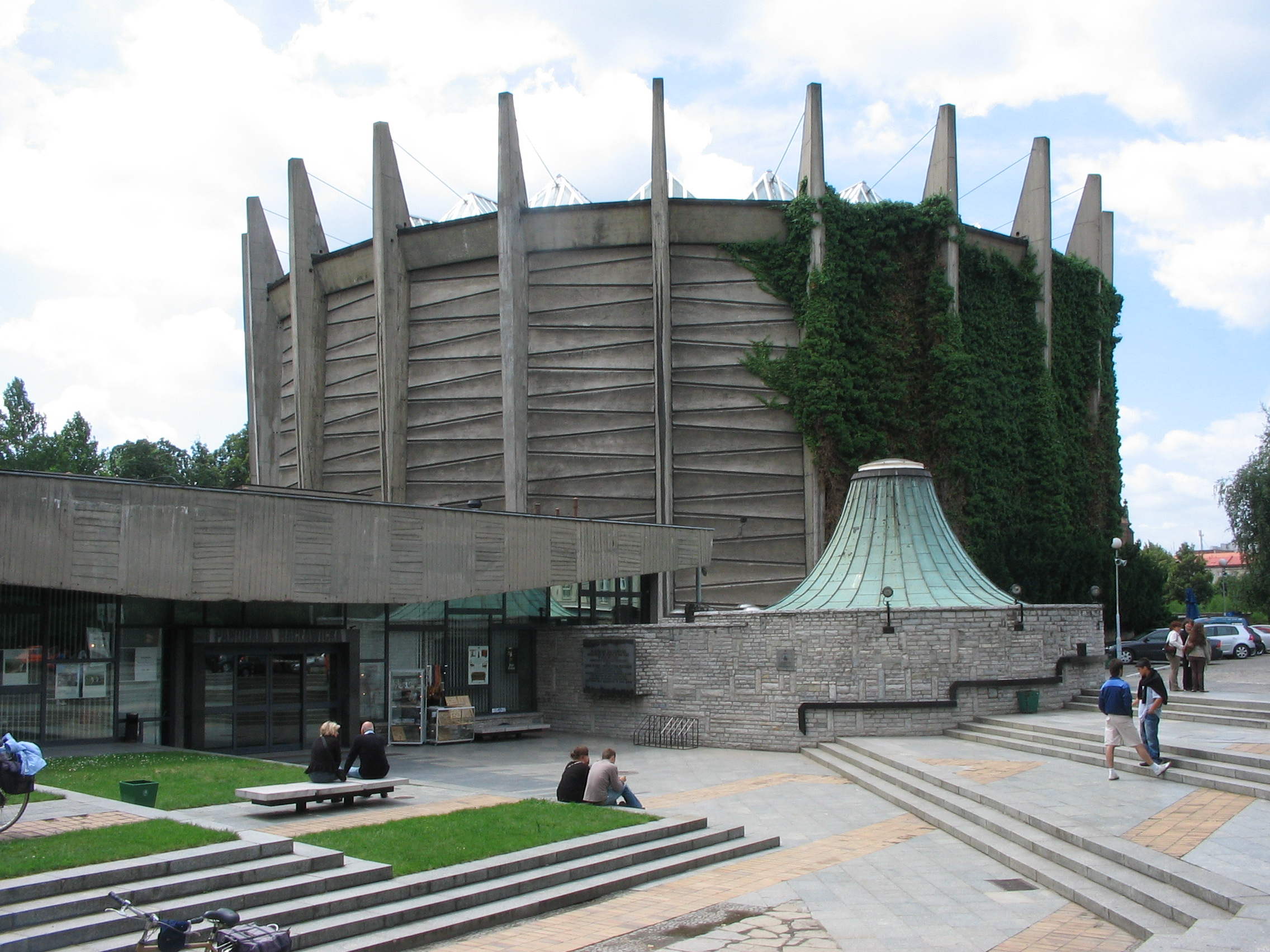 Rotunda Panoramy Raclawickiej we Wrocławiu